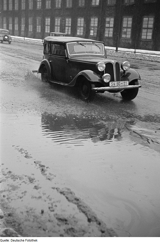 Original image description from the Deutsche Fotothek Bild Ein geschlossenes BMW-303-Cabriolet bei Regen